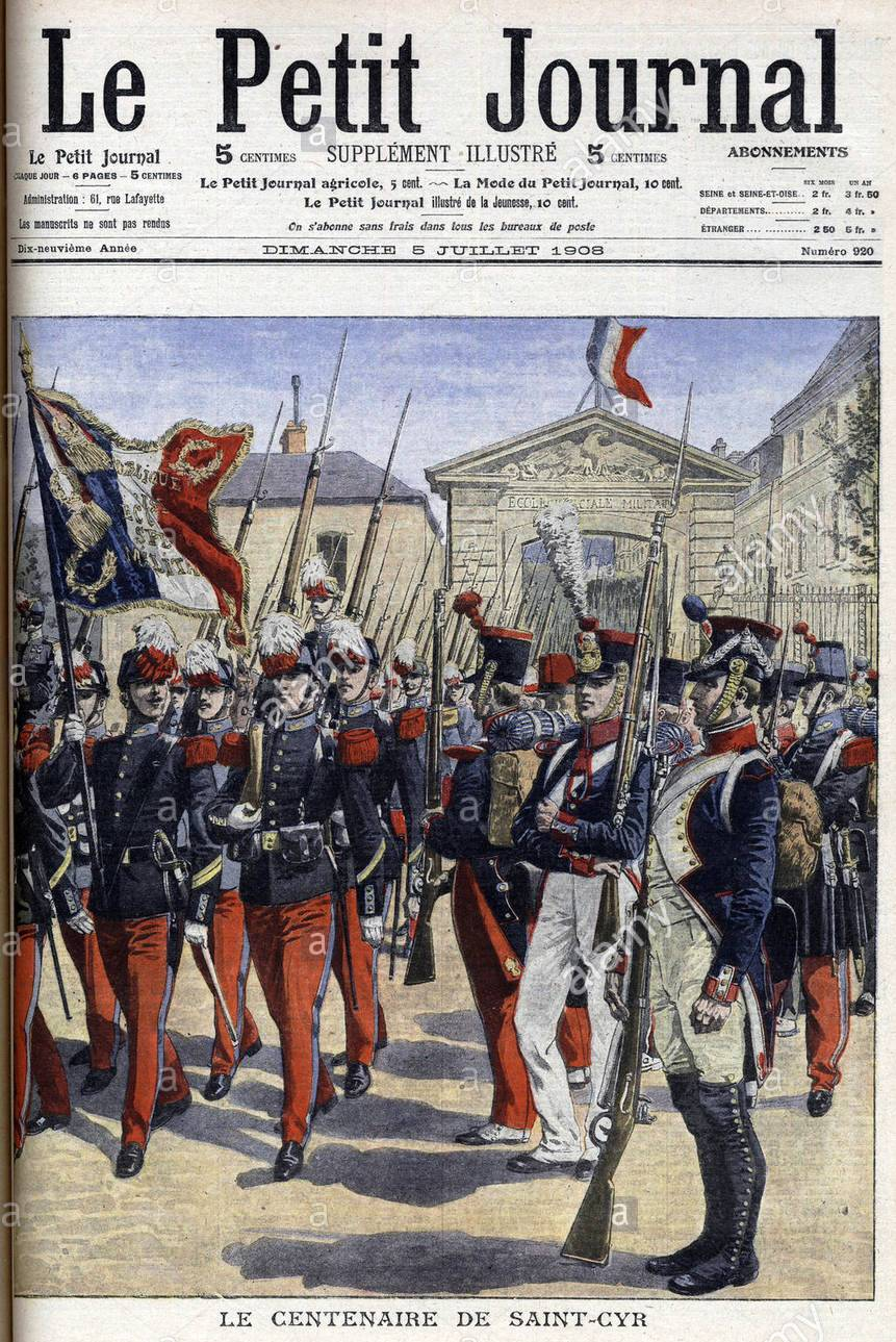 Le Petit Journal